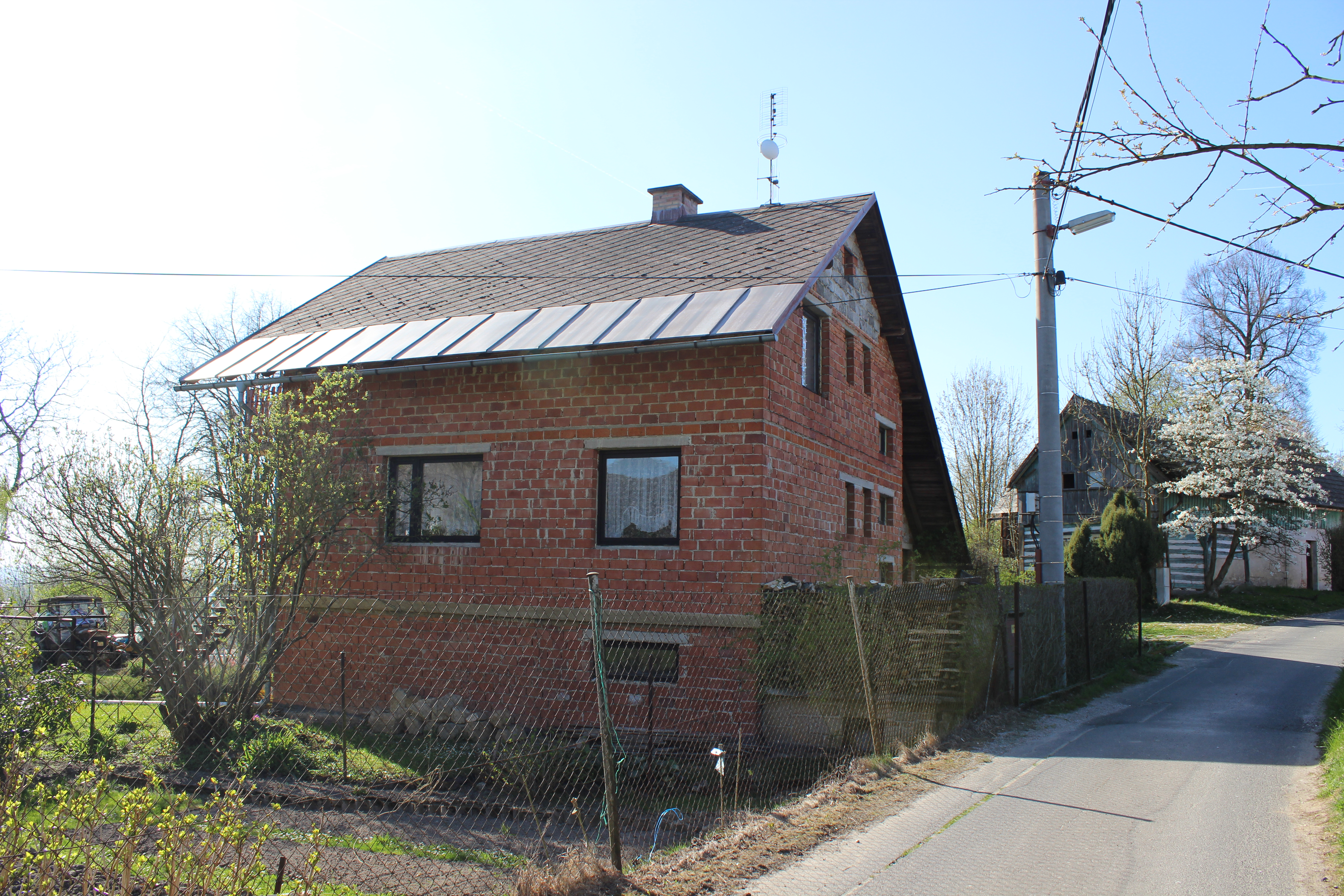 Dům číslo popisné 85 v Bukovině, části Mírové pod Kozákovem.